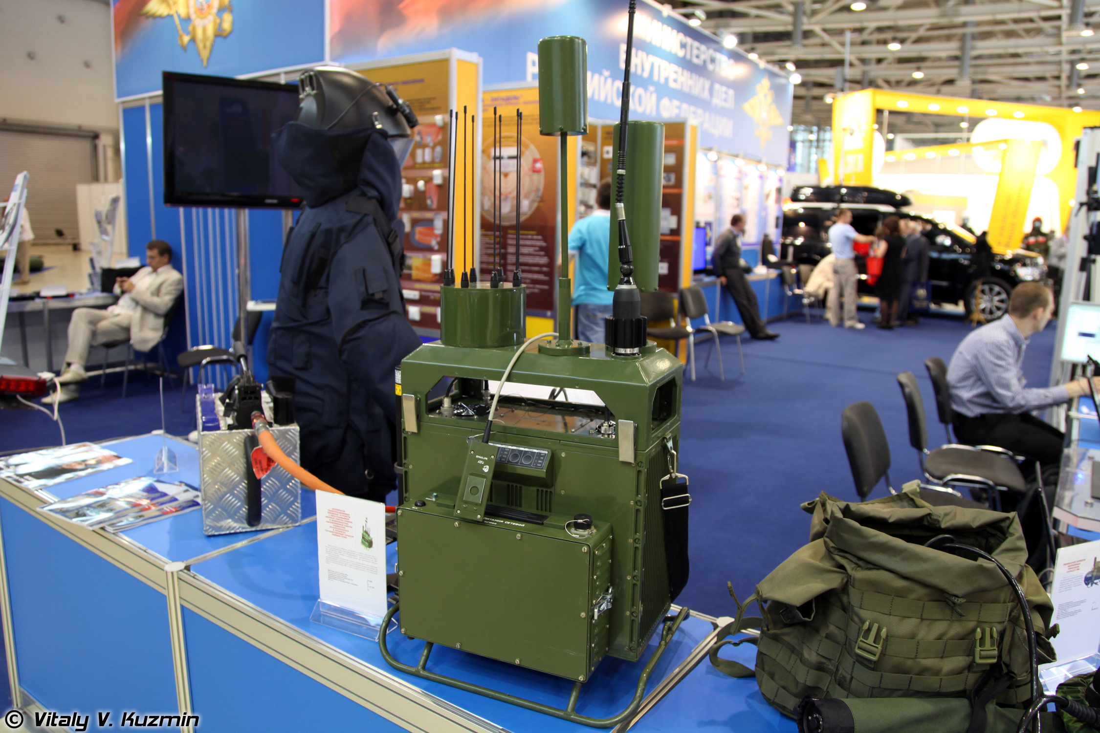 Блокиратор радиоуправляемых взрывных устройств Камыш-Сочи (Jamming device Kamish-Sochi)